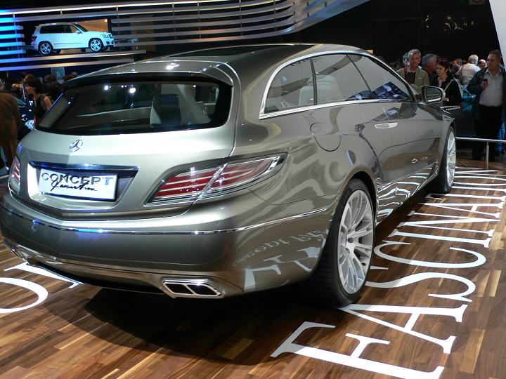 Mercedes - Concept Fascination